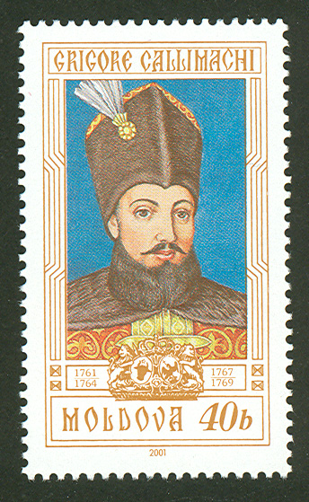 Marcă poştală